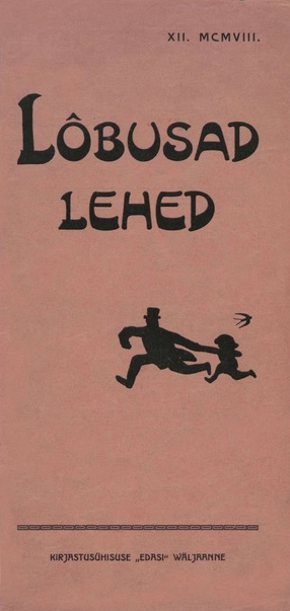 Lõbusad Lehed, esileht